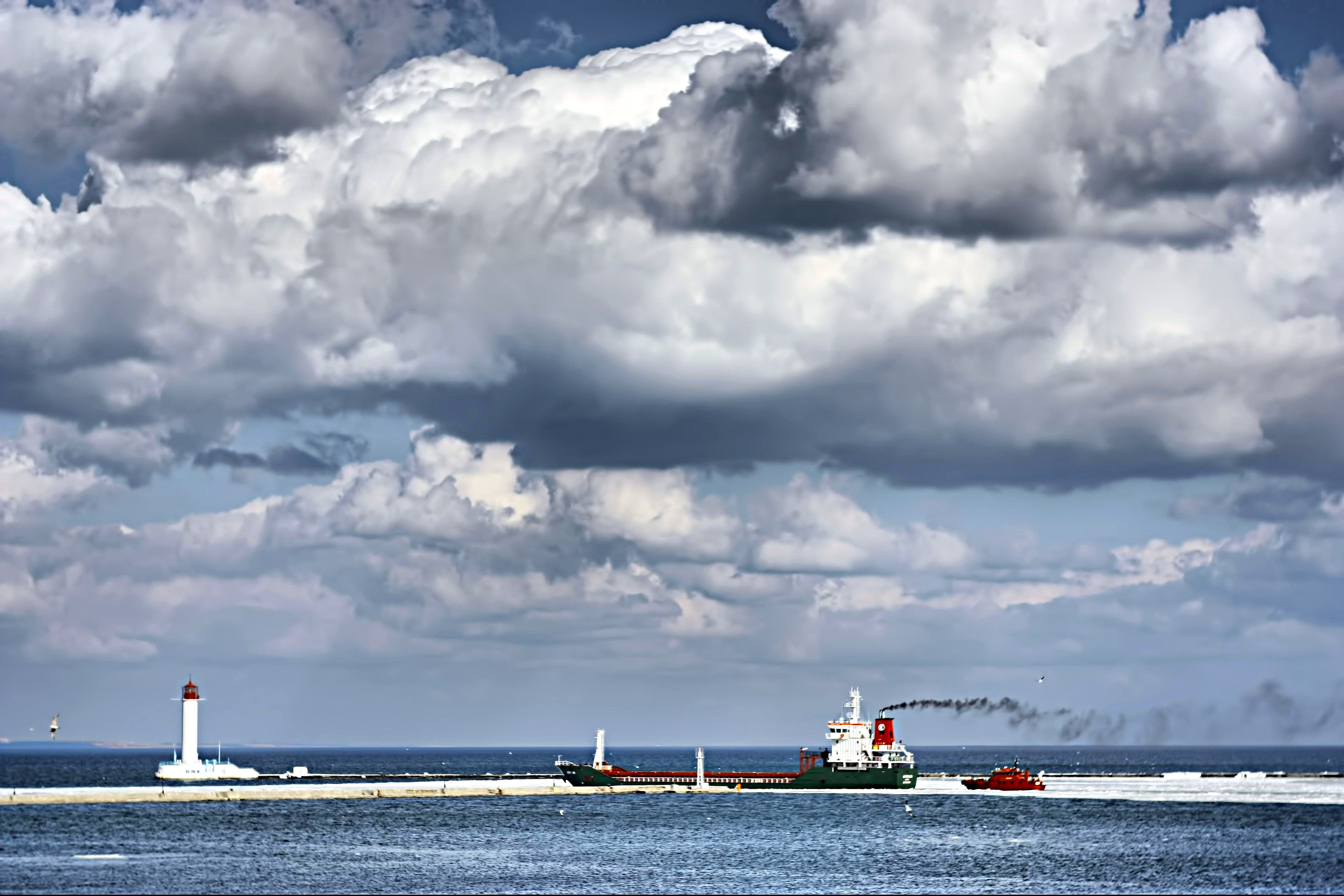 Воронцовський маяк, Одеса, Одеський морський торгівельний порт, Рейдовий мол